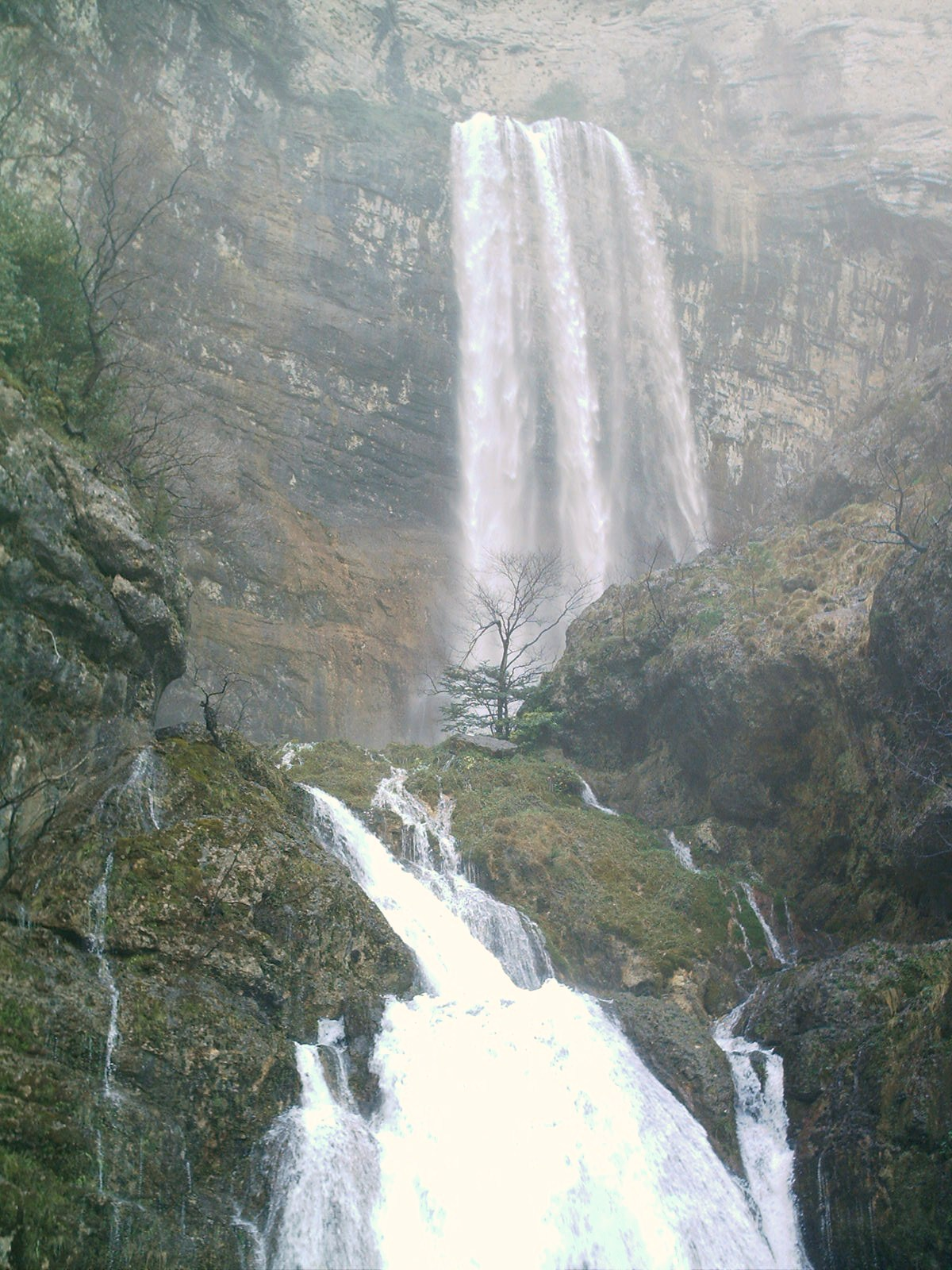 Imagen del nacimiento del río Mundo, en la provincia de Albacete, conocido popularmente como "Los Chorros", dentro del "Parque Natural de Los Calares del Río Mundo y de La Sima".